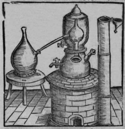 Alambic à tête de Maure, illustration du Grand Livre de Distillation de Brunschwig (1512)